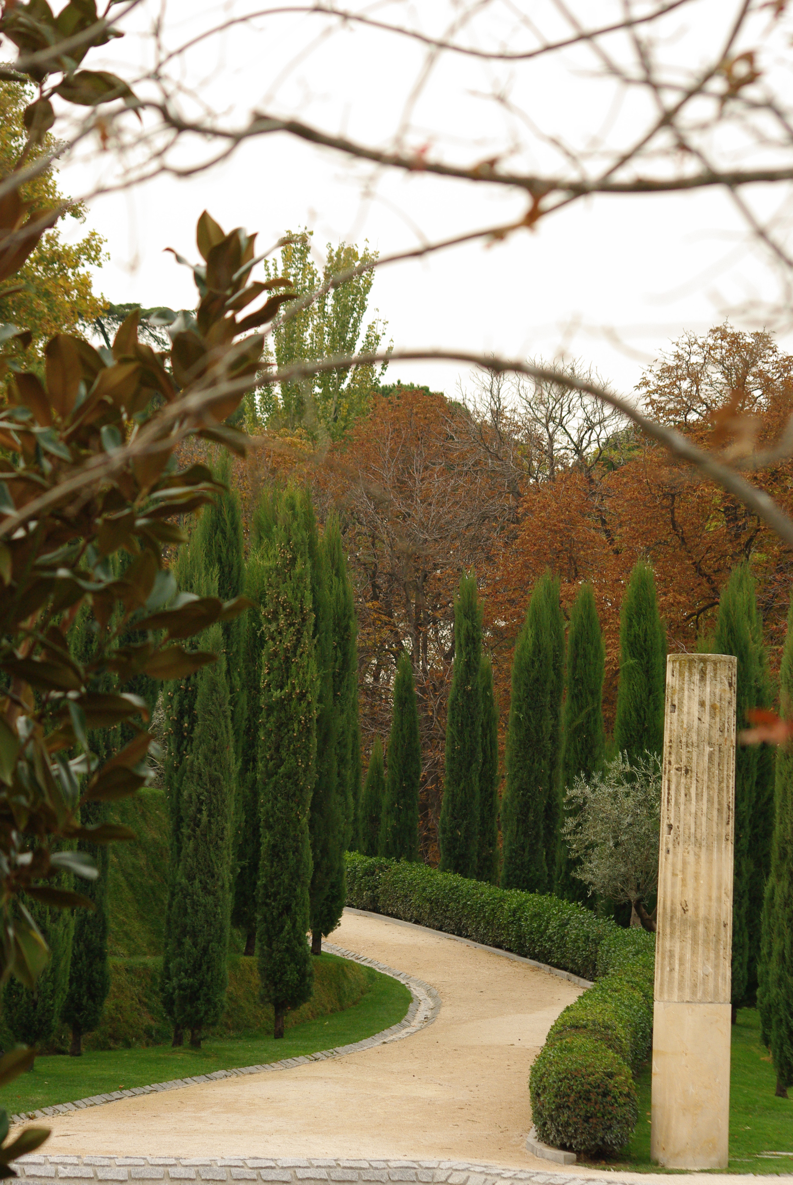 Bosque de los ausentes. Monumento a las víctimas del atentado del 11-M